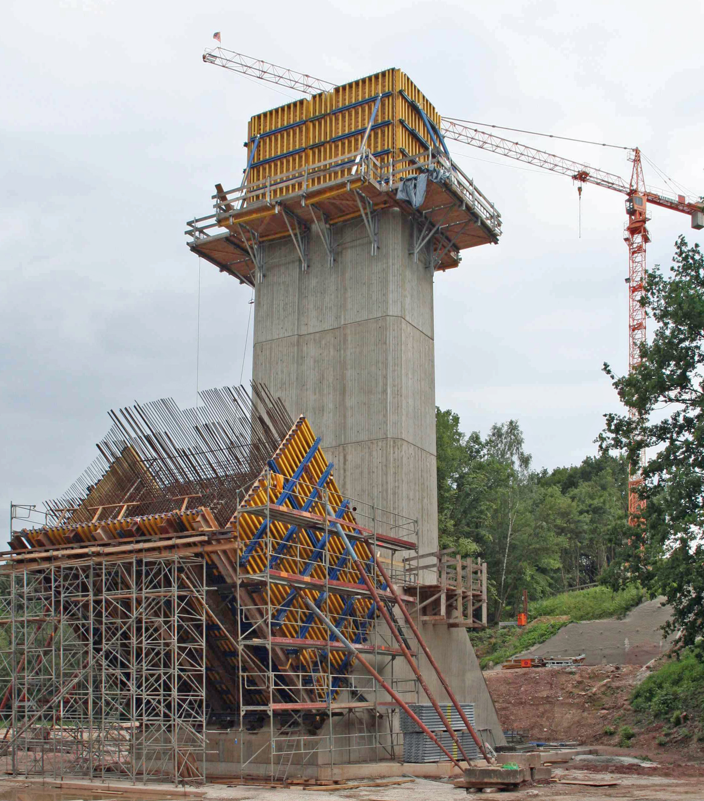 Talbrücke Froschgrundsee Landkreis Coburg, westliches Kämpferfundament der Bogenbrücke